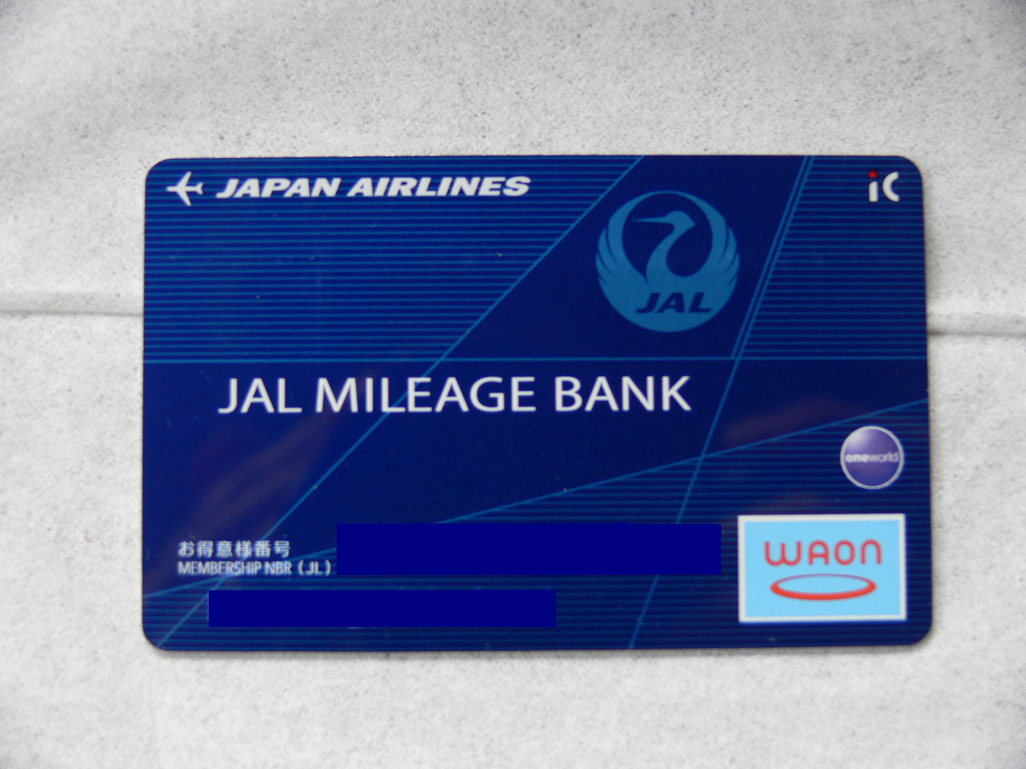 JMB-New_card